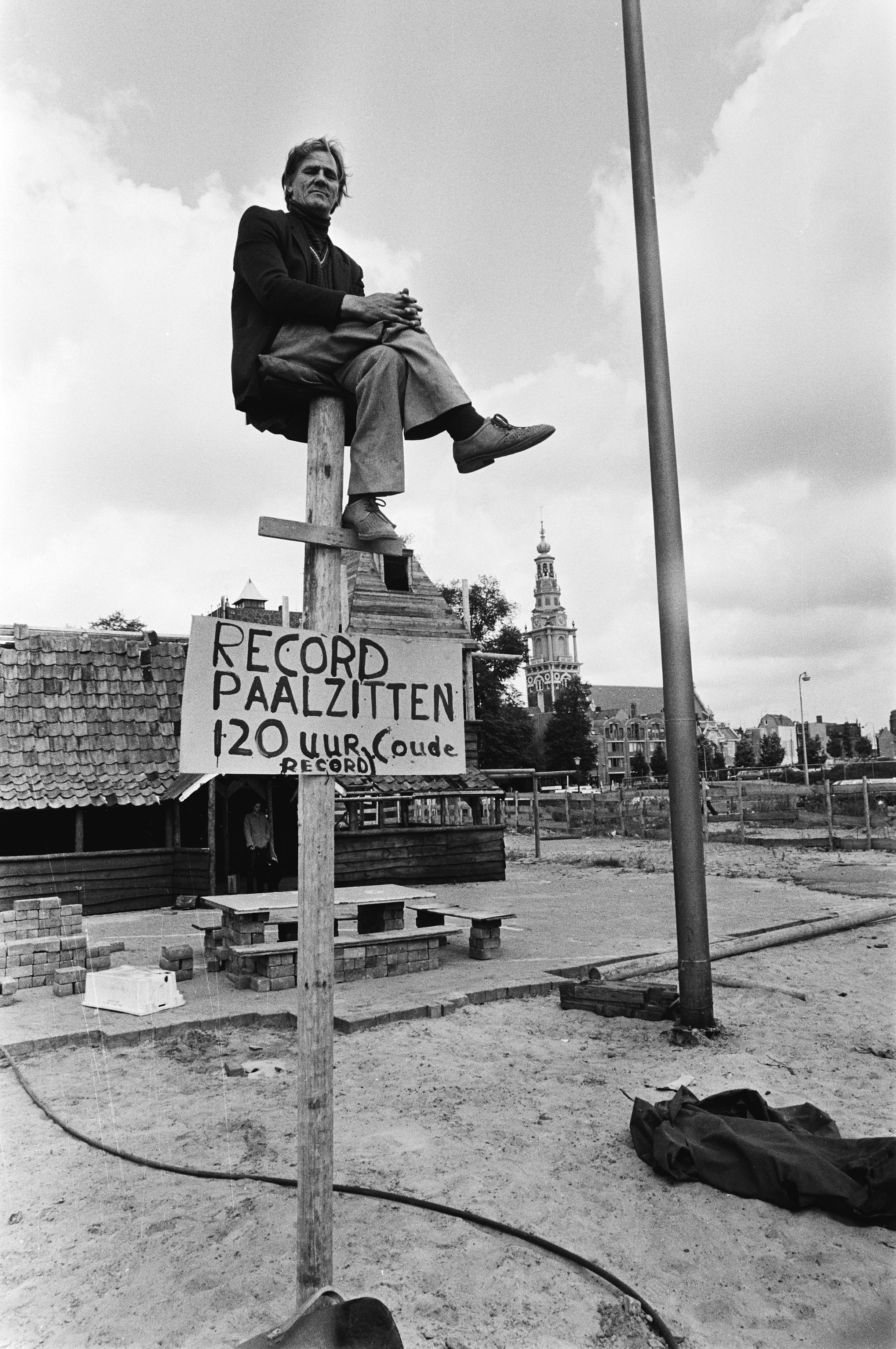 Collectie / Archief : Fotocollectie Anefo Reportage / Serie : Paalzitter op het Waterlooplein Beschrijving : Opschrift op het bord: "Record paalzitten 120 uur (oude record)" Datum : 21 juli 1979 Locatie : Amsterdam, Noord-Holland Trefwoorden : mannen, paalzitten, pleinen, sport Fotograaf : Dijk, Hans van / Anefo Auteursrechthebbende : Nationaal Archief Materiaalsoort : Negatief (zwart/wit) Nummer archiefinventaris : bekijk toegang 2.24.01.05 Bestanddeelnummer : 930-3639